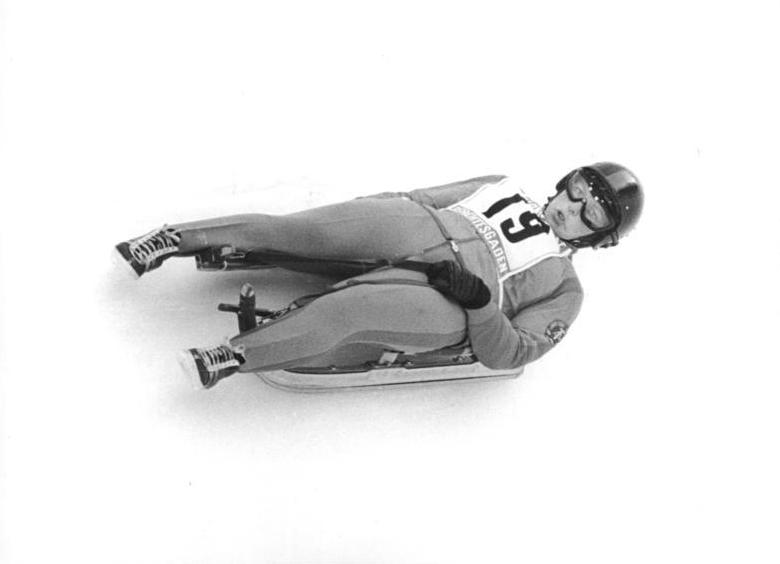 Petra Thierlich Zentralbild Gahlbeck 30.1.1969-Königssee-Westdeutschland: Weltmeisterschaften im Rennschlittensport vom 27.1.-2.2.1969-Die DDR-Sportlerin Petra Thierlich (SC Traktor Oberwiesenthal) beim Training auf der Kunsteis-Rennschlittenbahn in Königssee. Für die Damen-Rennen ist der Kurs 900 m lang (Höhenunterschied 90 m, 10 Prozent Gefälle und 12 Kurven).